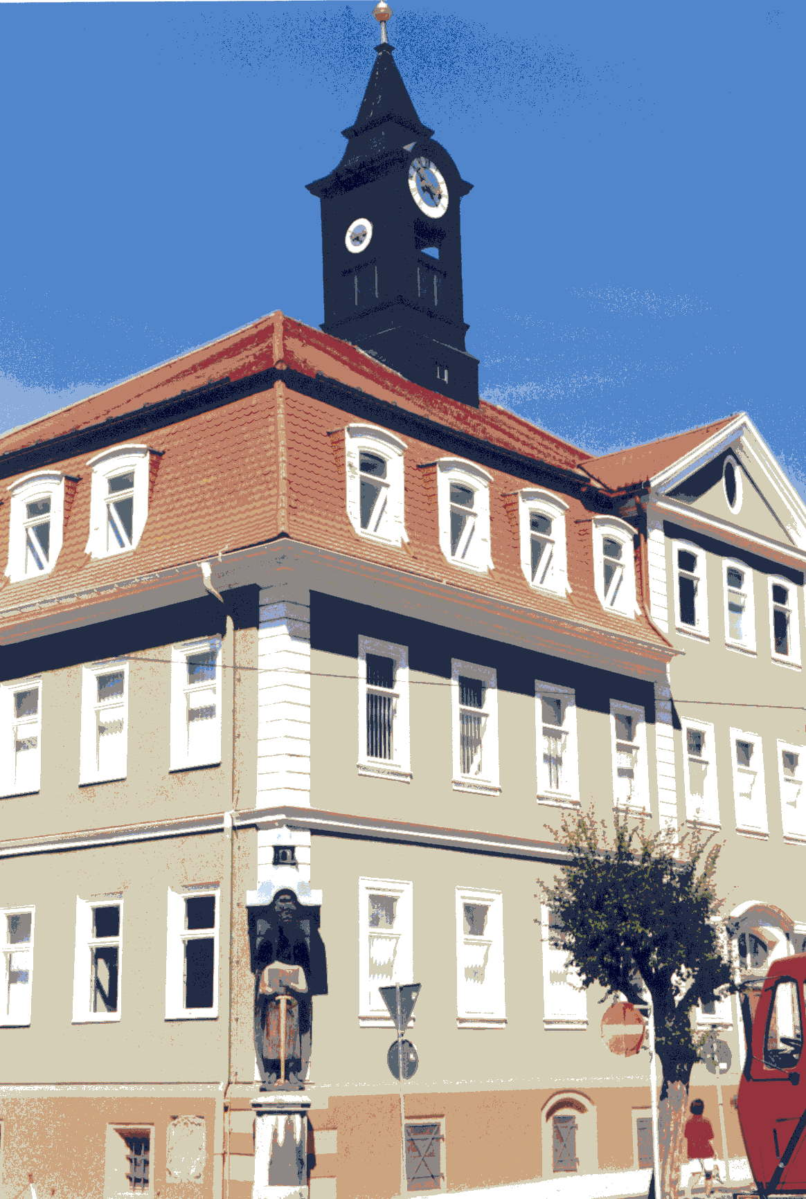 Ohrdruf